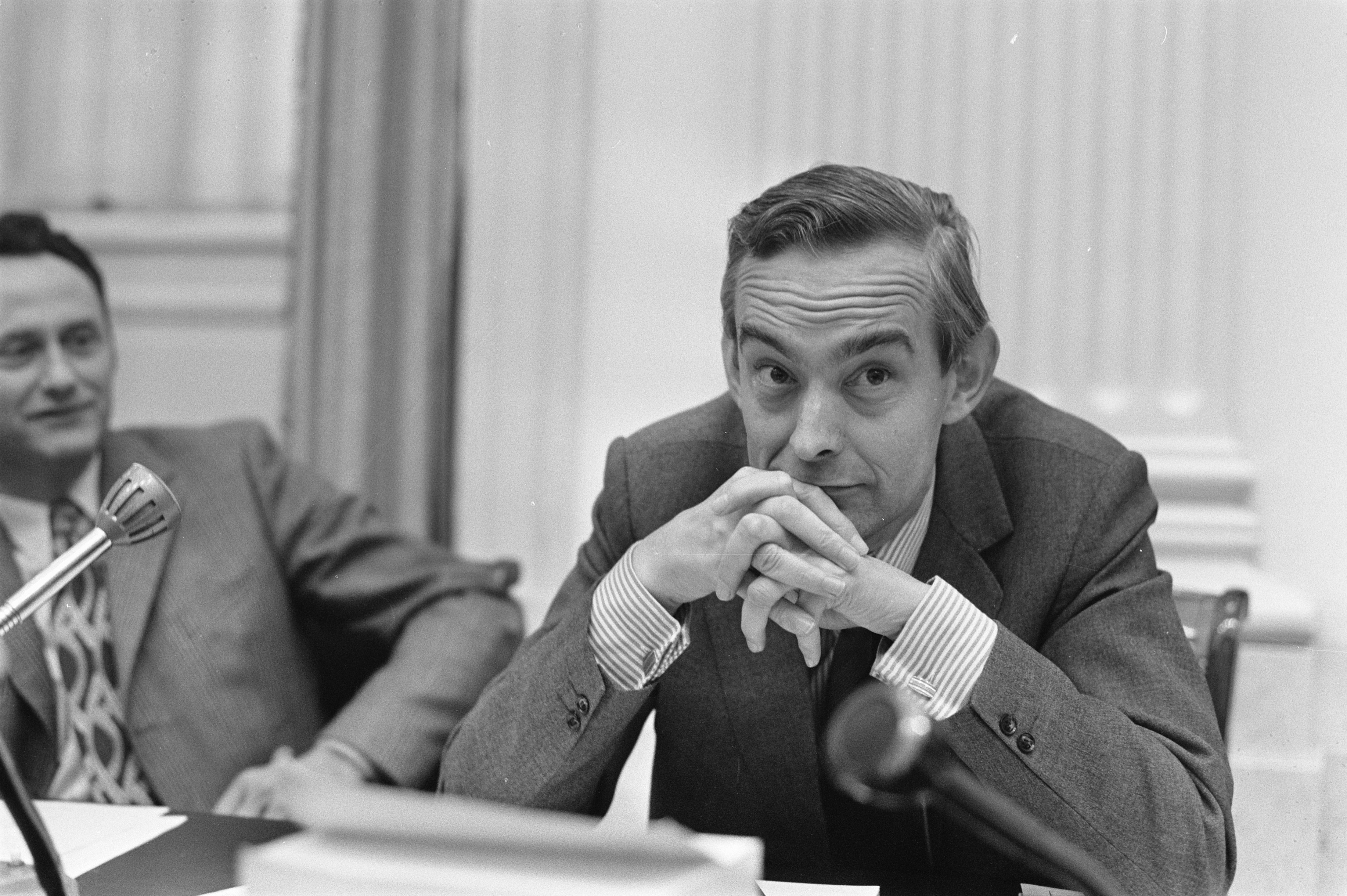 Collectie / Archief : Fotocollectie Anefo Reportage / Serie : [ onbekend ] Beschrijving : Debat over prijsstop in Tweede Kamer, Minister Langman Datum : 23 november 1972 Locatie : Den Haag, Zuid-Holland Trefwoorden : ministers, parlementaire debatten, politiek, portretten, prijsafspraken Persoonsnaam : Langman, H. Fotograaf : Mieremet, Rob / Anefo Auteursrechthebbende : Nationaal Archief Materiaalsoort : Negatief (zwart/wit) Nummer archiefinventaris : bekijk toegang 2.24.01.05 Bestanddeelnummer : 926-0489